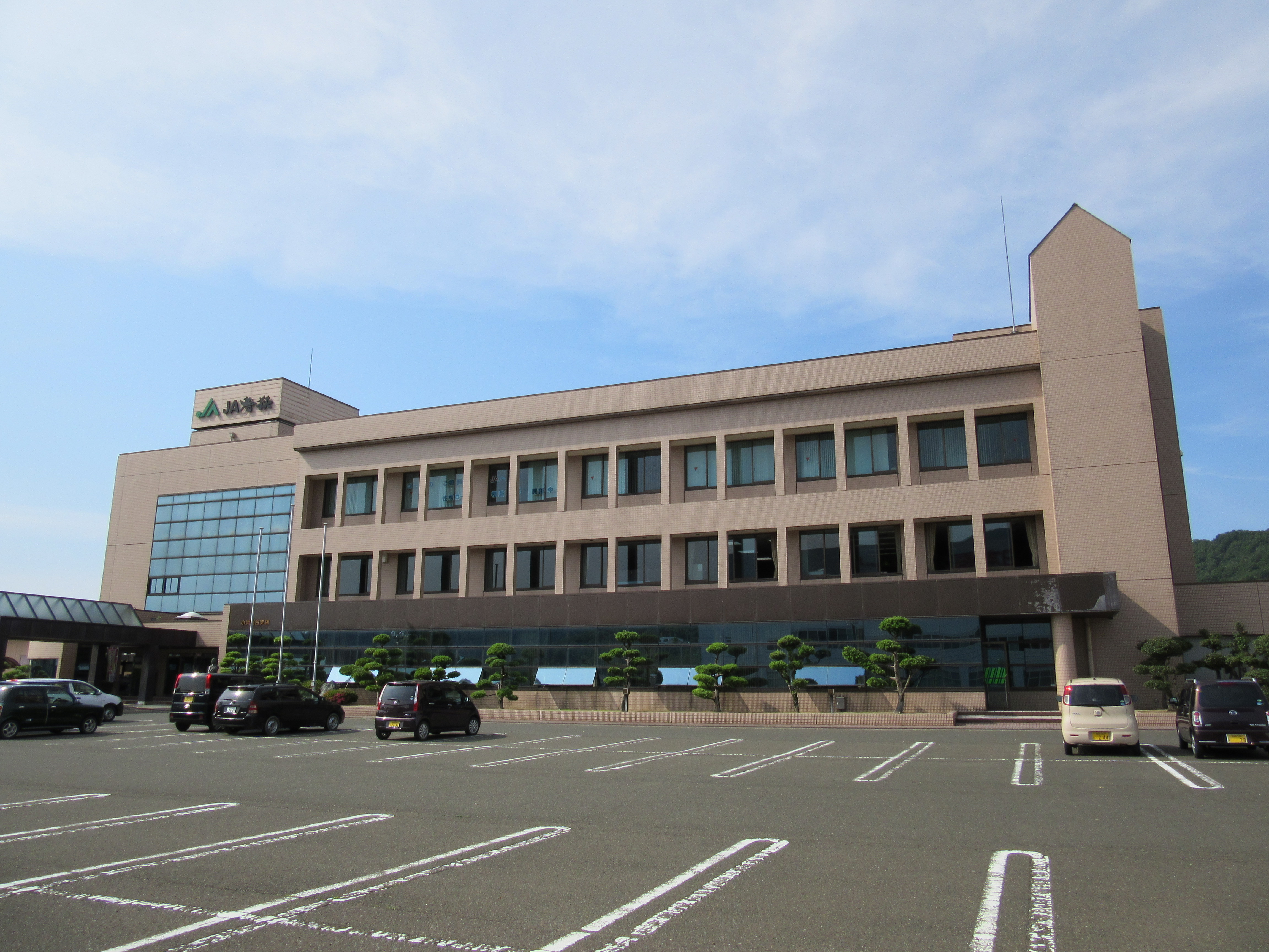 若狭農業協同組合本店